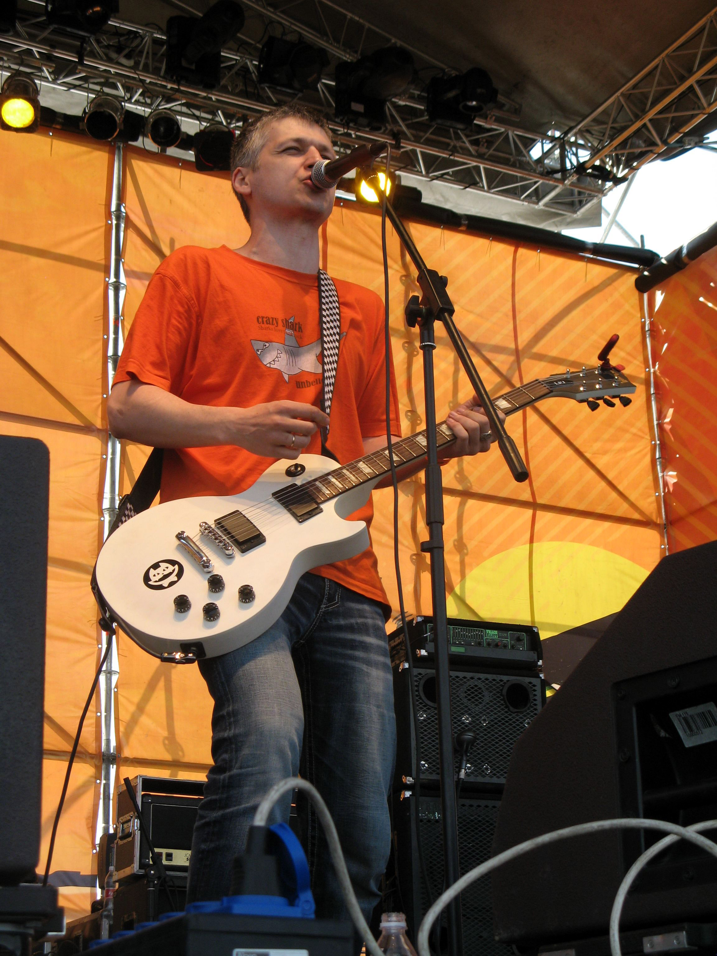 Группа "Znaki" на фестивале «Rock-Line-2014»